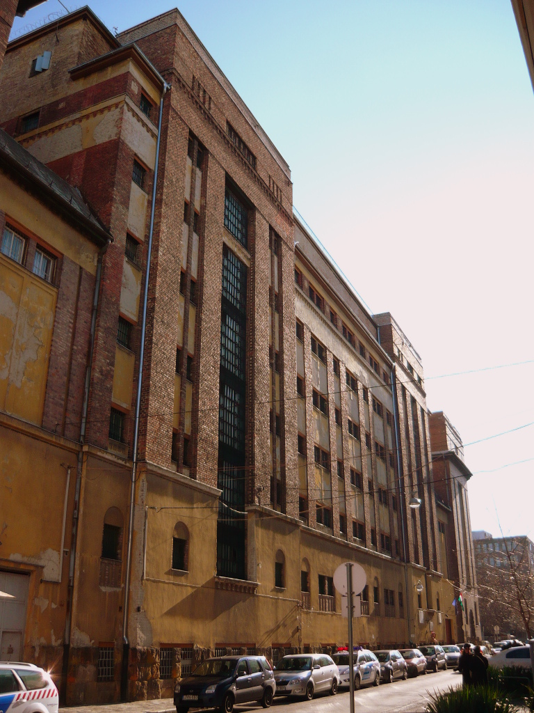 Fővárosi Büntetés-végrehajtási Intézet II-es objektum. - Budapest, II. Gyorskocsi u. 25.